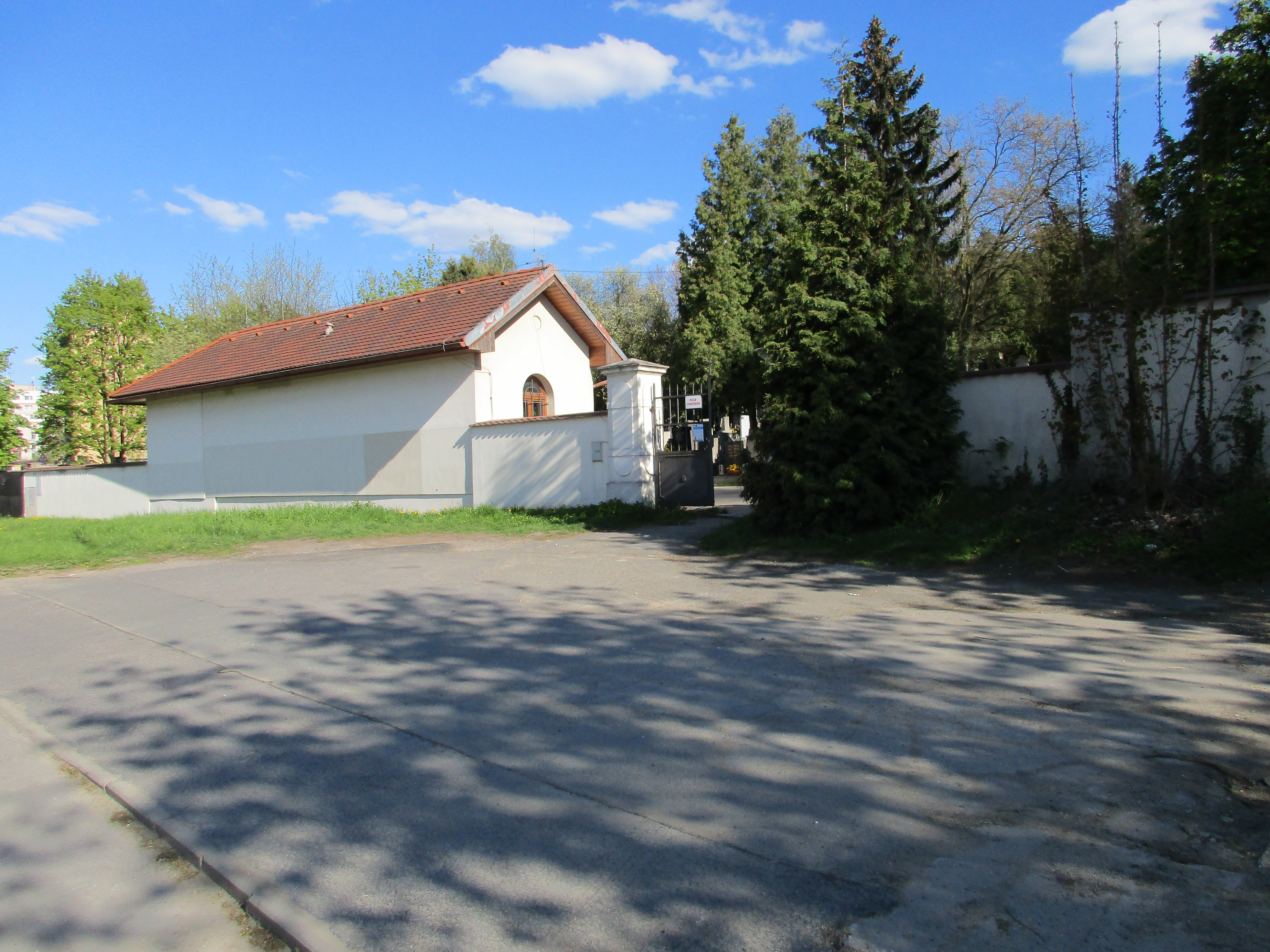 Hřbitov v Braníku